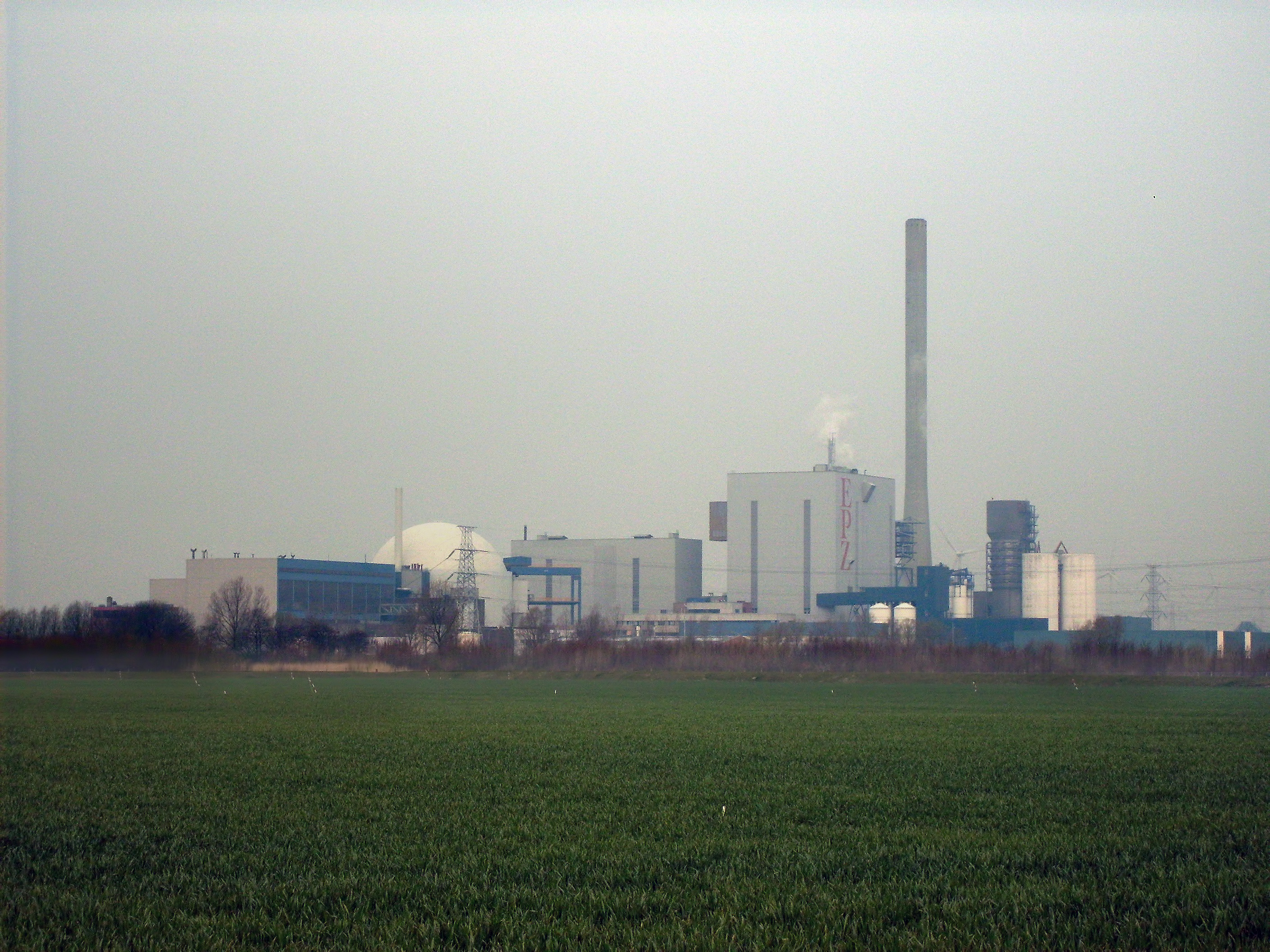 Borssele